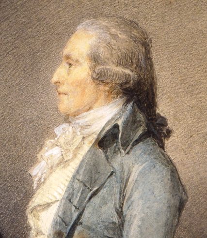 Anders Sparrman, naturaliste suédois